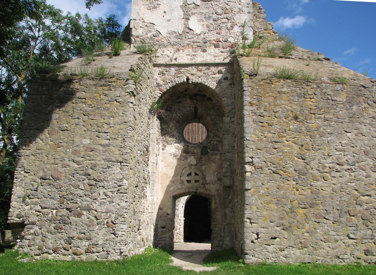 Käina Martin's Church ruins, Käina, Hiiumaa, Estonia